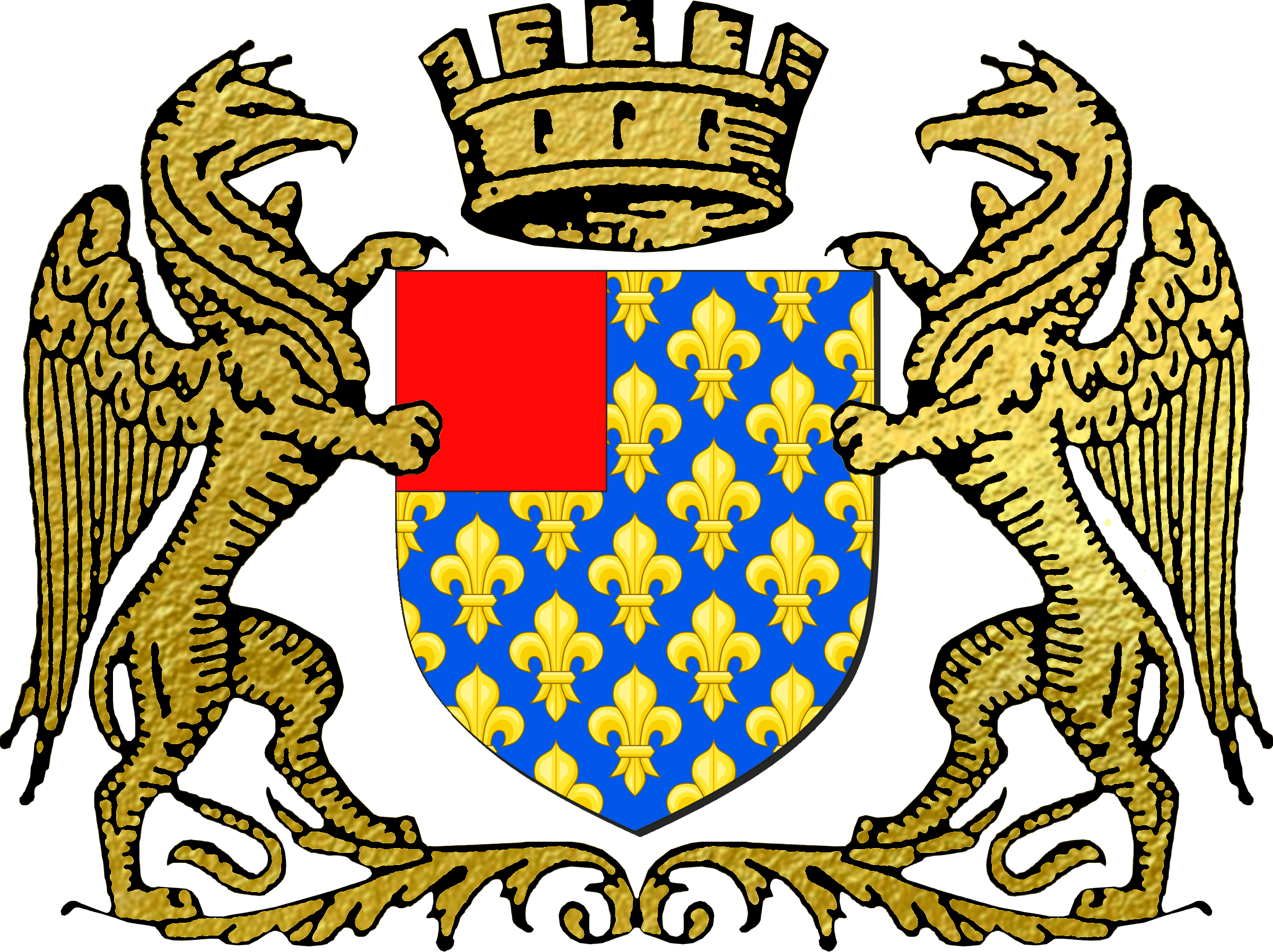 Ancienne armoirie de la ville de Thouars (reproduction)